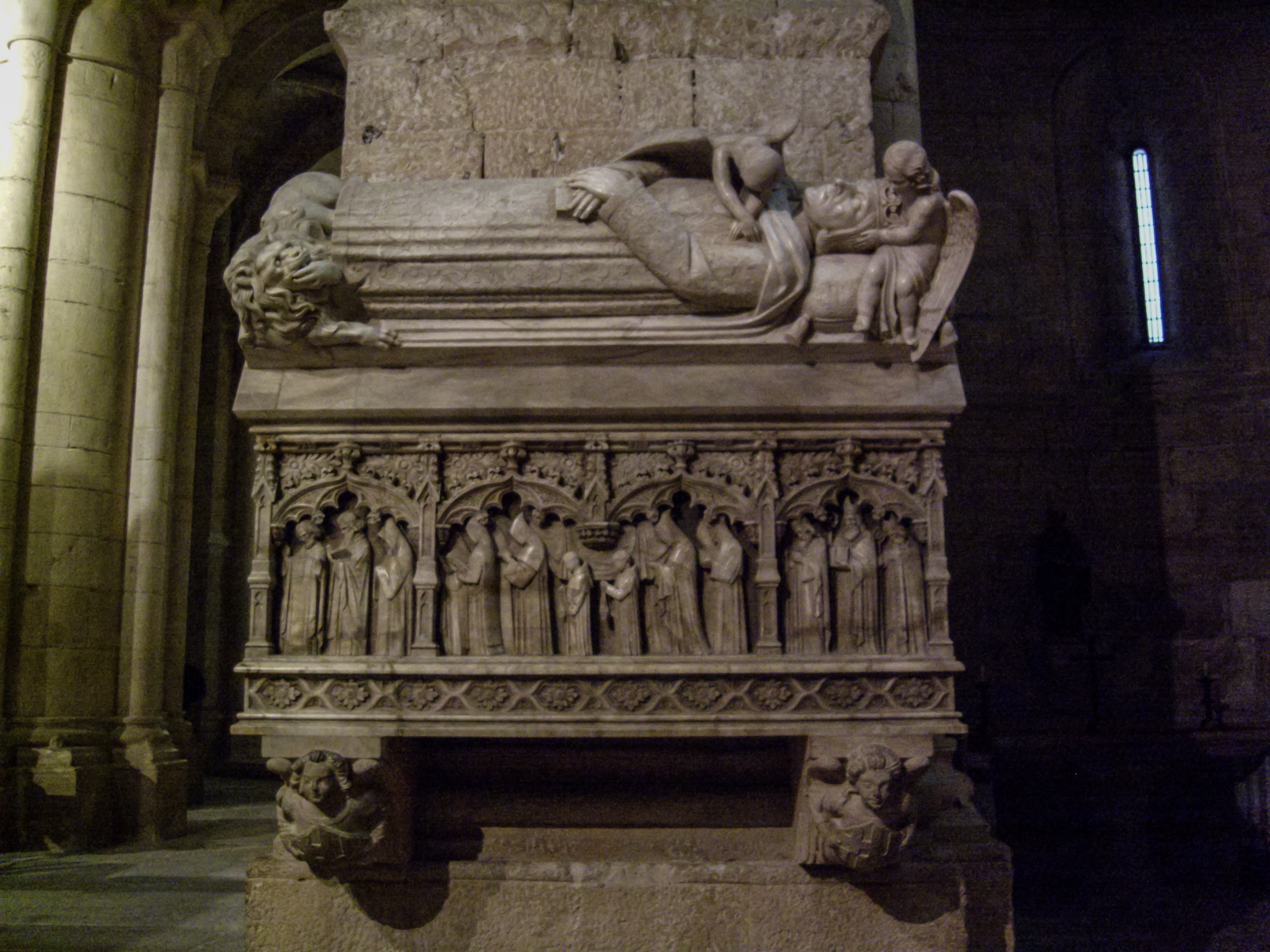 CS 02052009 #165450 #40540.jpg